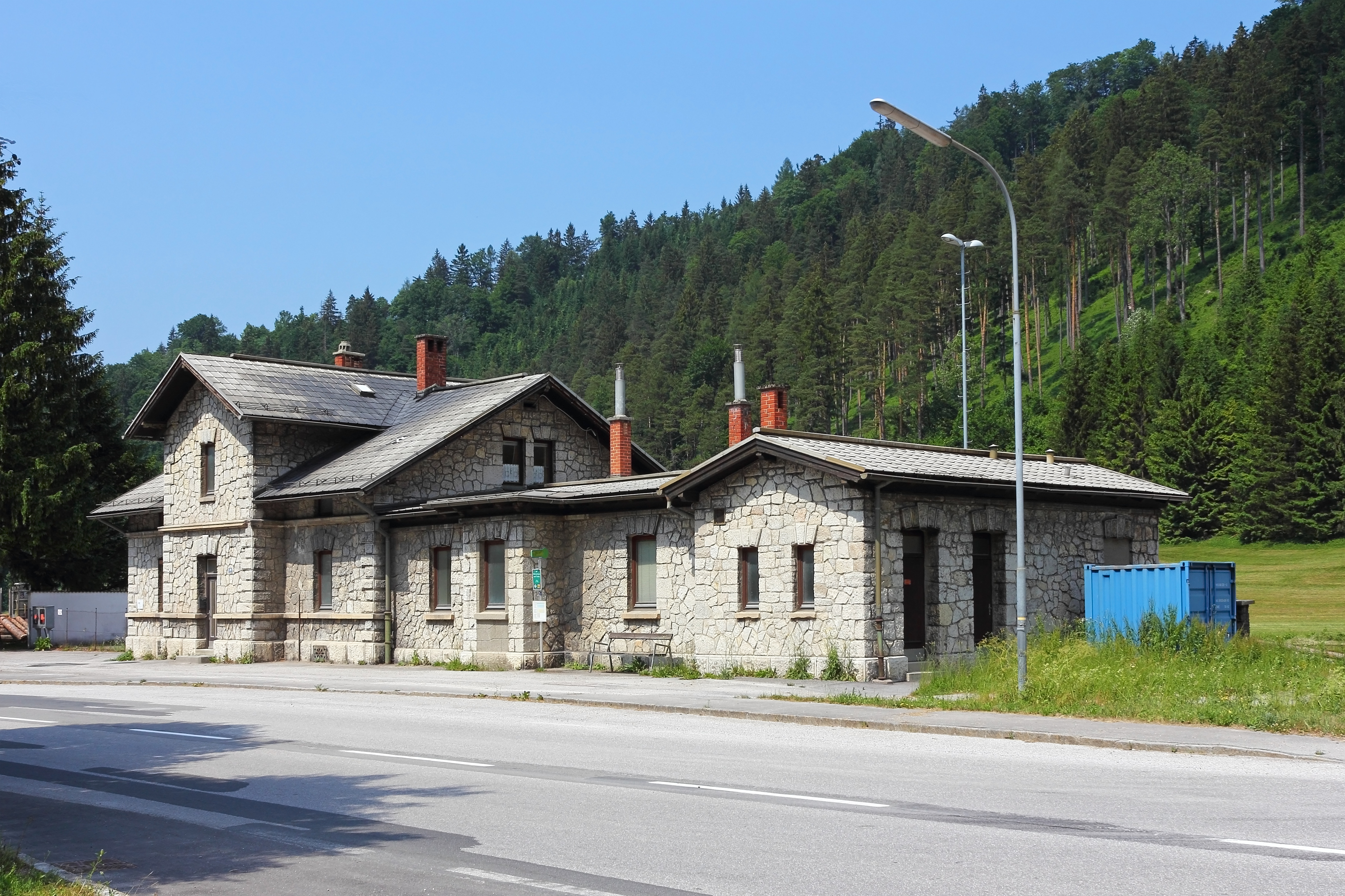 Der Bahnhof in Freiland ist ein um 1893 errichter, mehrteiliger Bau aus Naturstein.